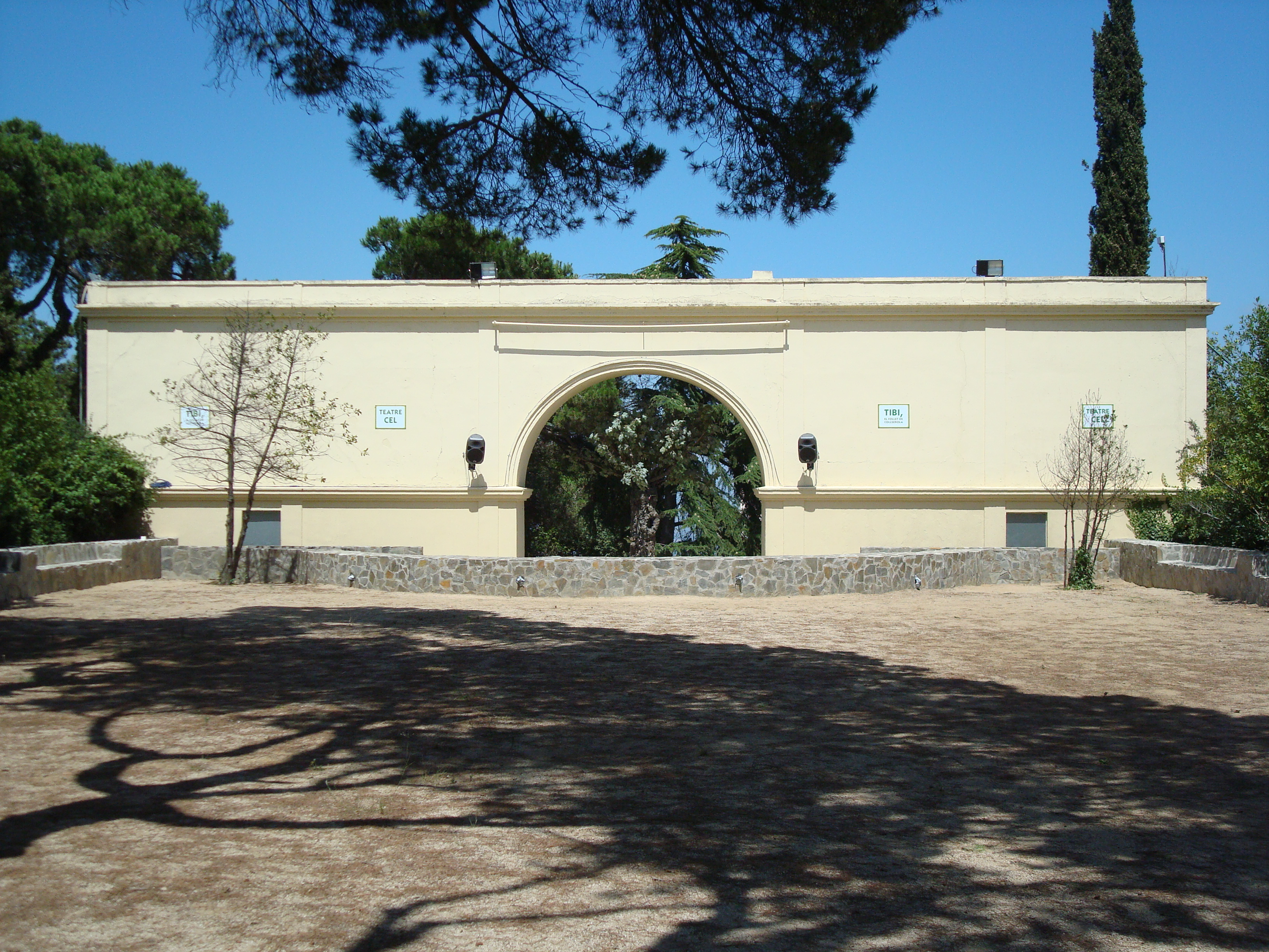 Teatre del Cel al final del Camí del Cel, al Parc d'Atraccions del Tibidabo.